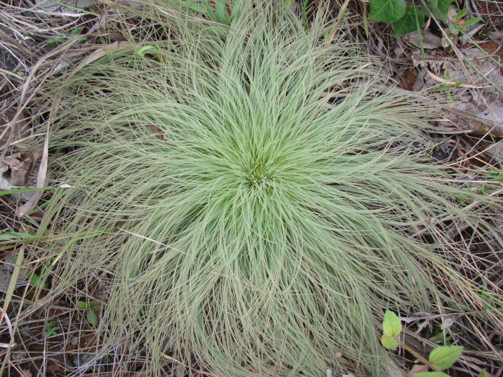 Bulbostylis paradoxa - CYPERACEAE Chapada Imperial - Brasília - Distrito Federal - Brasil.